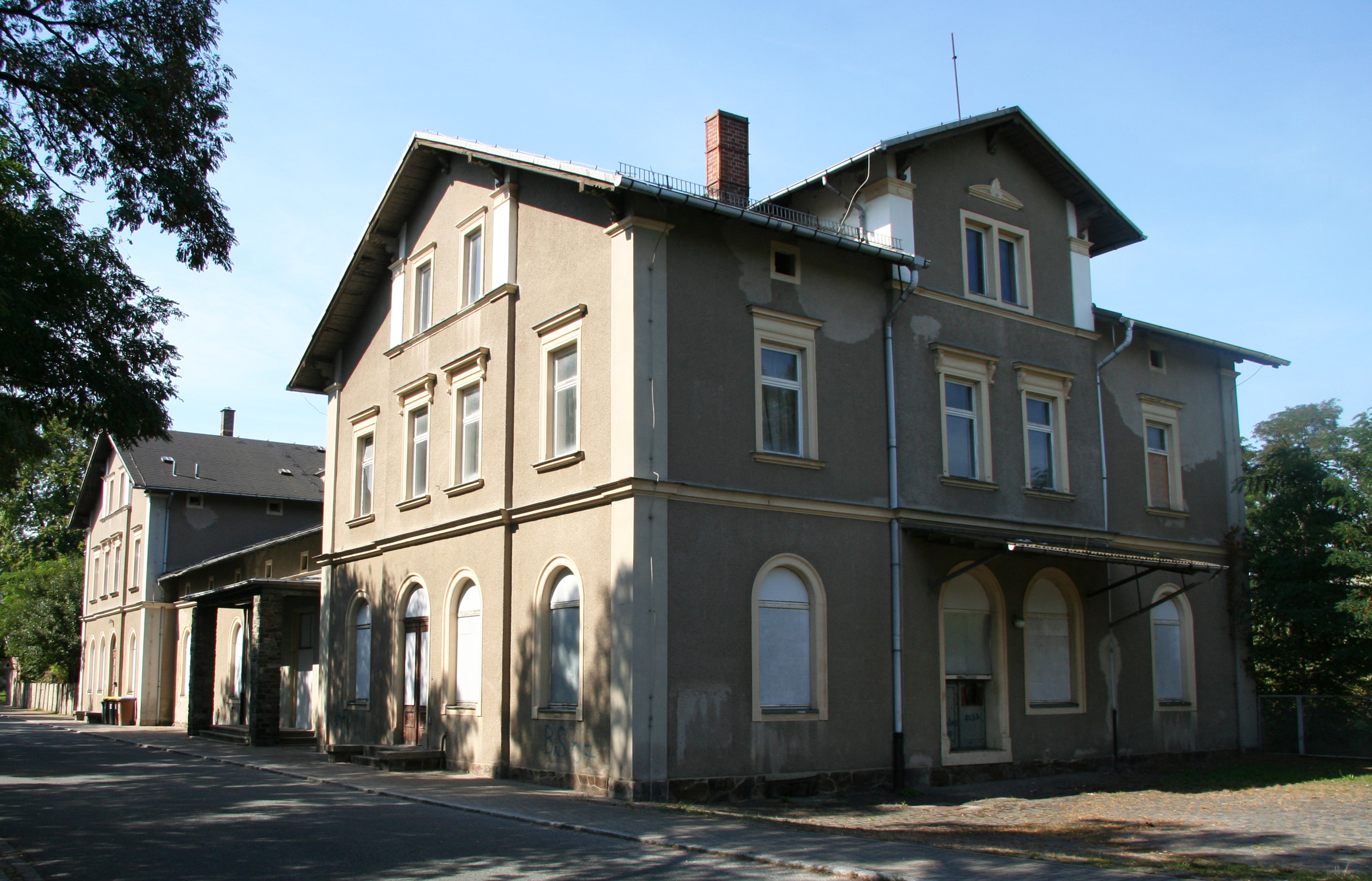 Bahnhofsgebäude in Penig